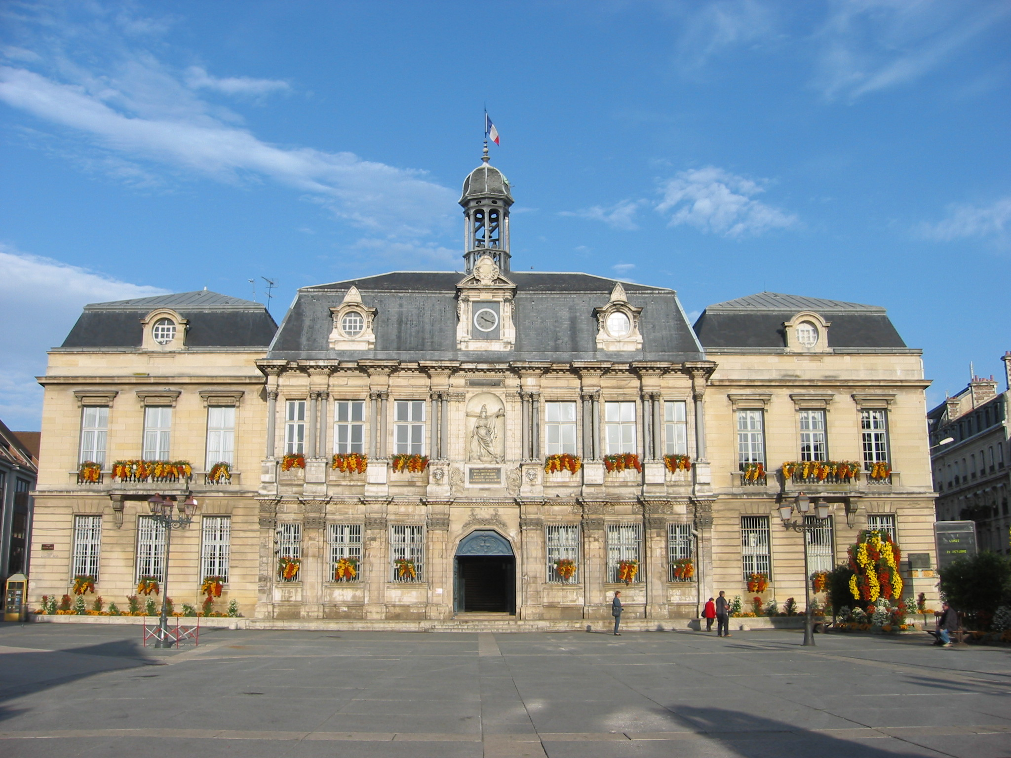 Hôtel de ville de Troyes (Aube, France).